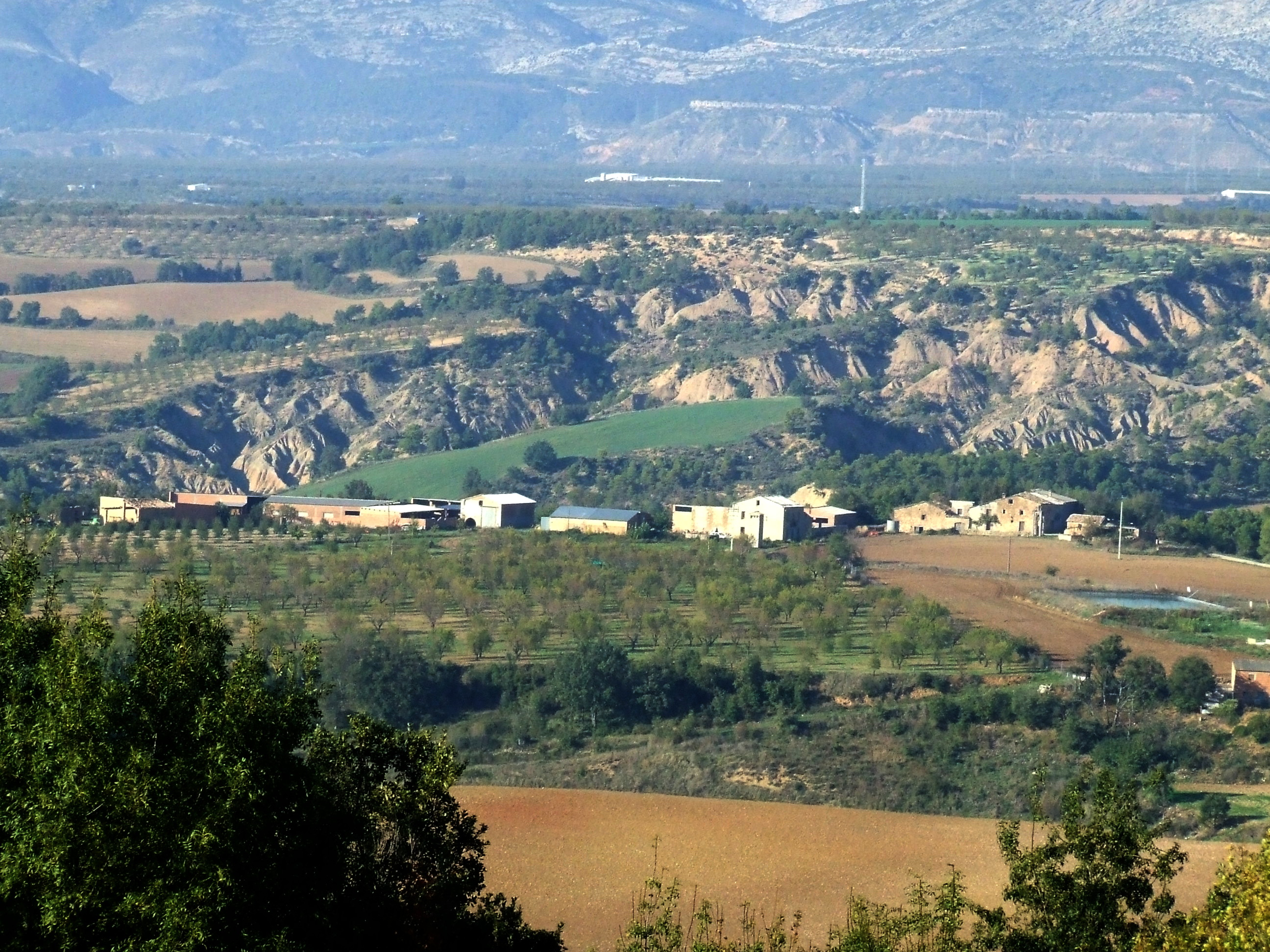 Els Masos de Sant Martí des de Covet (Isona, Isona i Conca Dellà, Pallars Jussà)